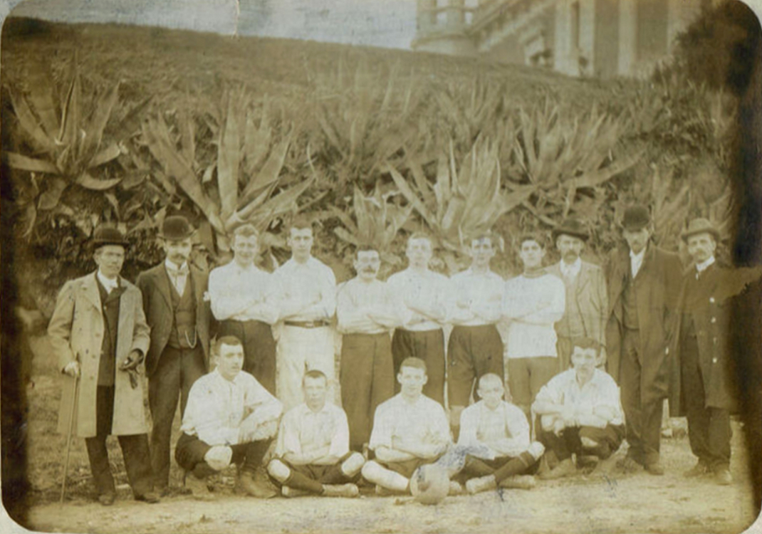 Instantània de l'històric Escocès Foot-ball Club, un dels primers equips formats a Barcelona, integrat bàsicament per membres de la colònia escocesa.